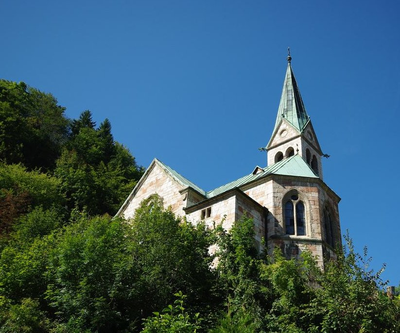 Ludwig-Ganghofer-Str. 28 1/2, 83471 BerchtesgadenThis is a photograph of an architectural monument.